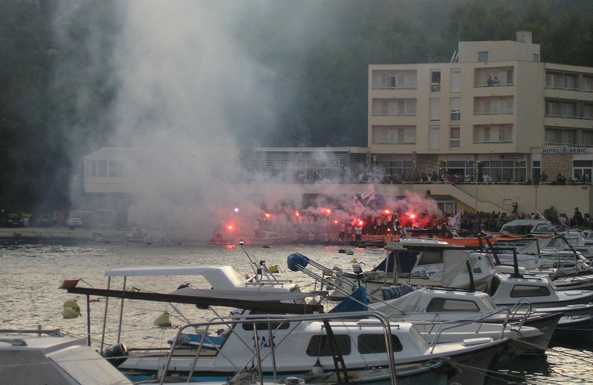 Doček lađara u cilju u Pločama (Maraton lađa 2011.)